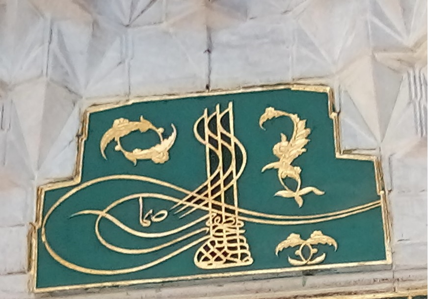 İstanbul, Fatih semtinde, Nişancı Mehmed Paşa Camii giriş kapısı üzerinde Nişancı Mehmed Paşa'nın çizdiği III. Murad Han tuğrası